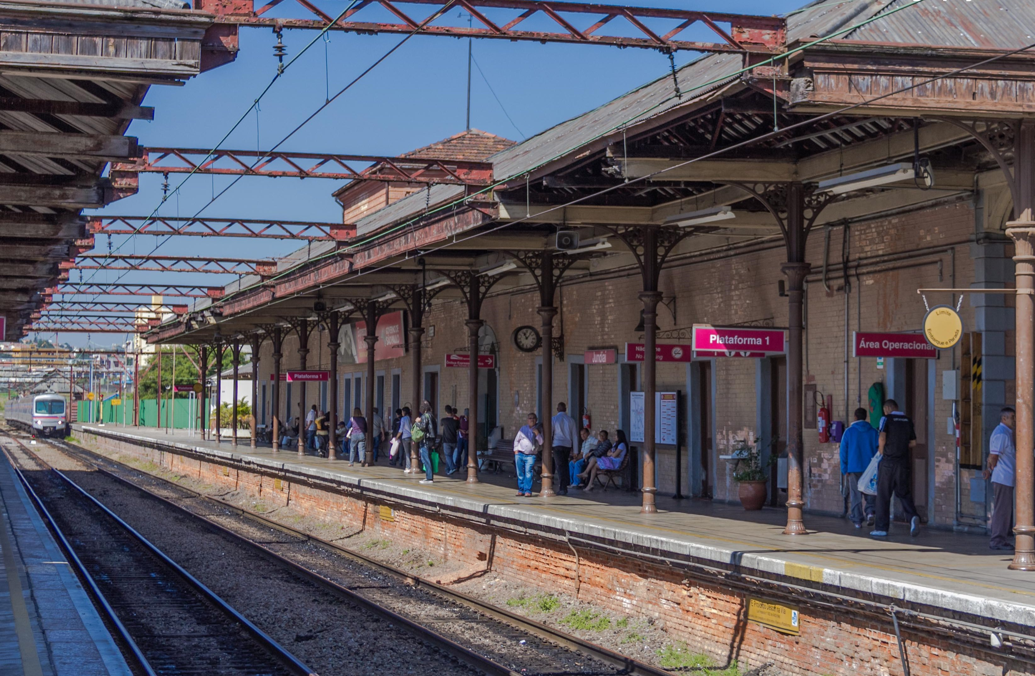 Estaço ferroviária de Jundiai e expresso turístico da CPTM